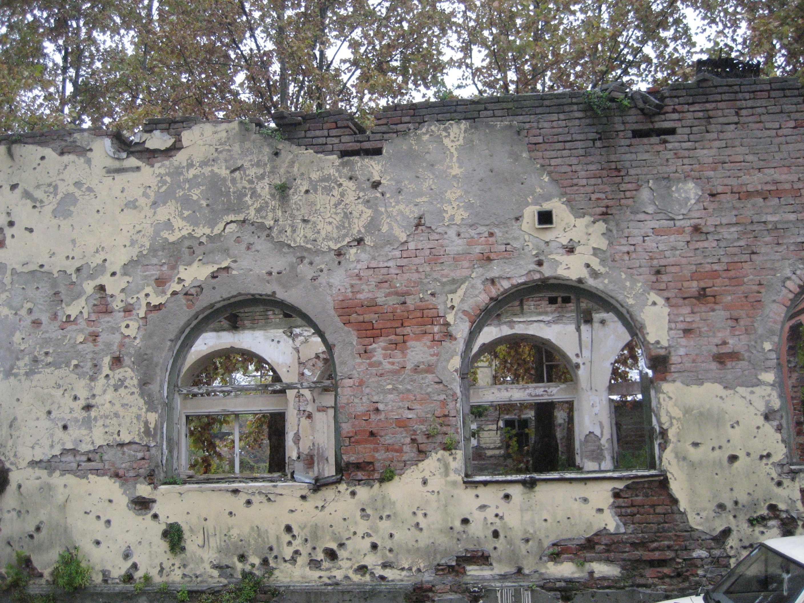 Castle Eltz, Vukovar